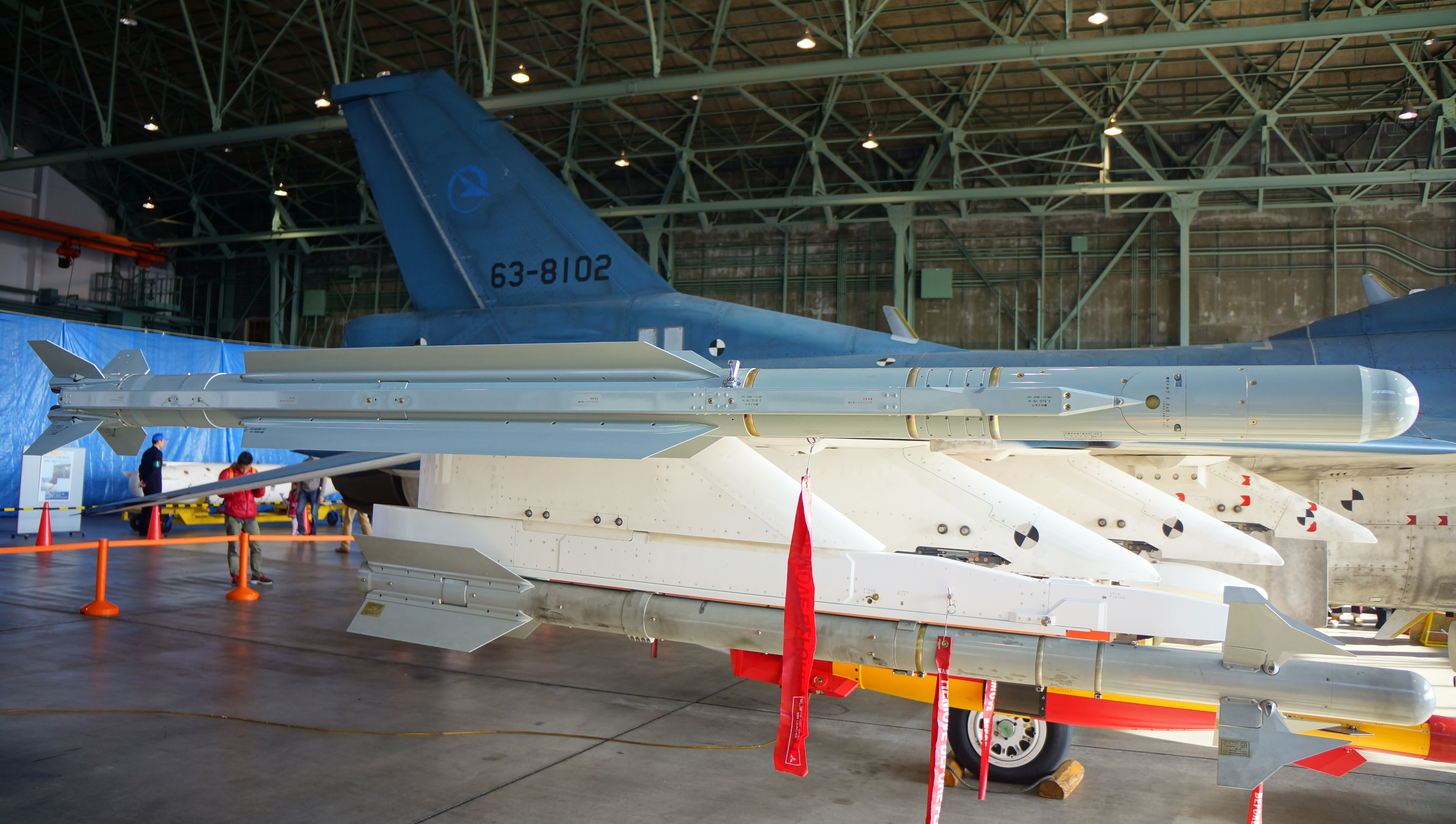 航空自衛隊 04式空対空誘導弾（AAM-5）。 13年11月24日 航空自衛隊岐阜基地にて。